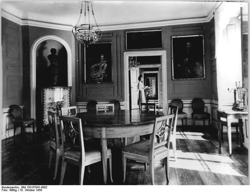 Weimar, Wittumspalais ADN-ZB Wiitig 18.10.1959 Zum 200. Geburtstag von Friedrich von Schiller am 10. November 1959 Goethe- und Schiller-Gedenkstätte in Weimar UBz: Blick in das Wittumspalais in Weimar. An diesem Tisch fand allwöchentlich die berühmte Freitagsrunde statt, an der neben Goethe auch Herder, Wieland Schiller und andere Persönlicjkeiten teilnahmen.